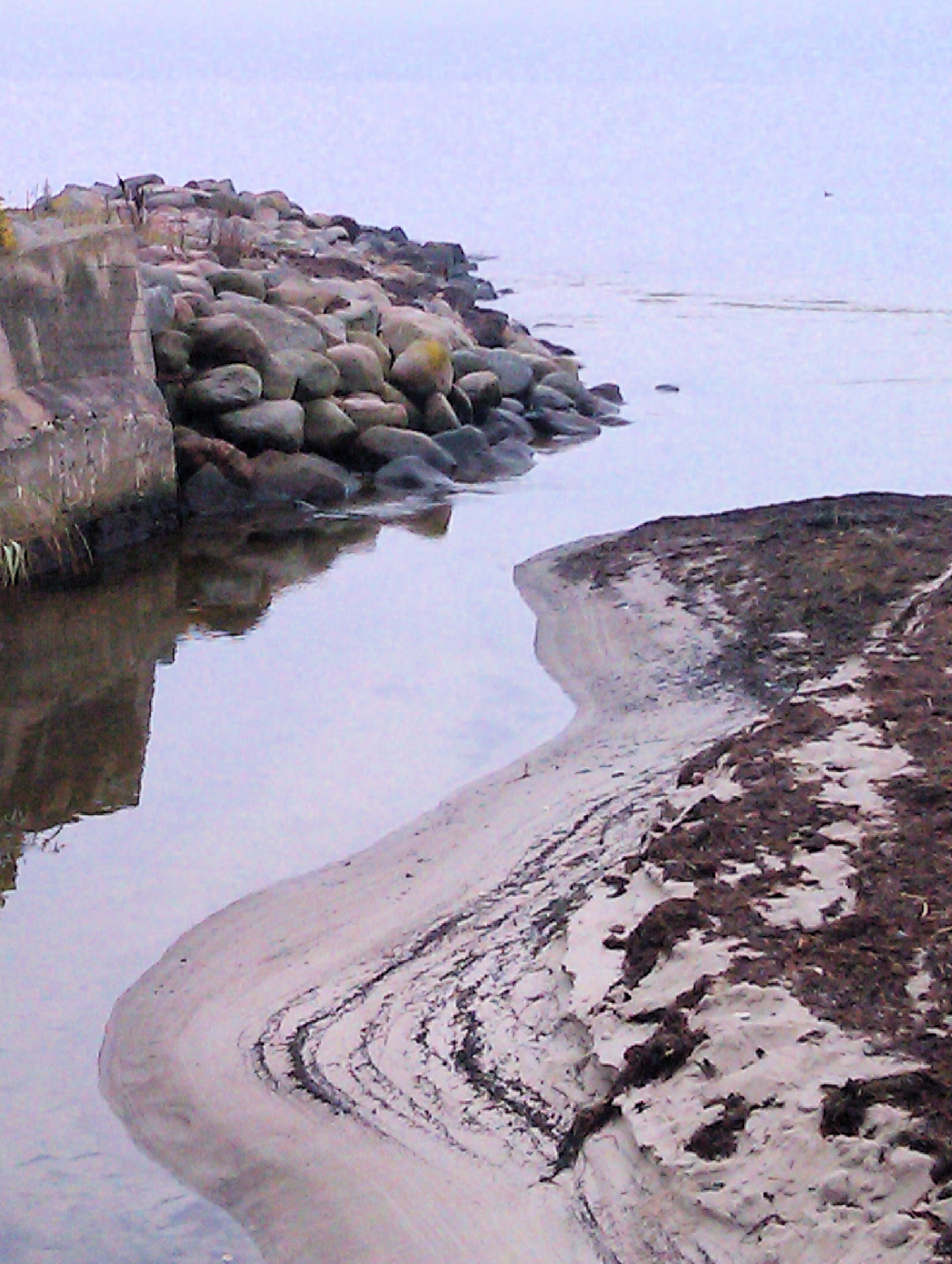 Faxe Å ved Faxe Ladeplads, Sjælland